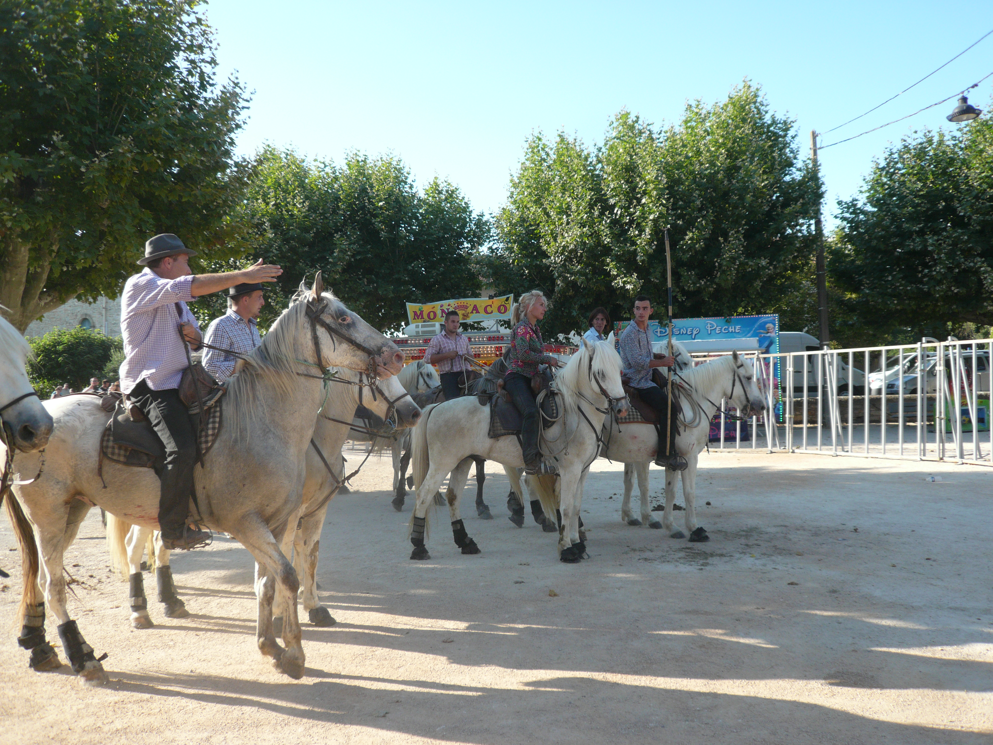 présentation de la manade au public